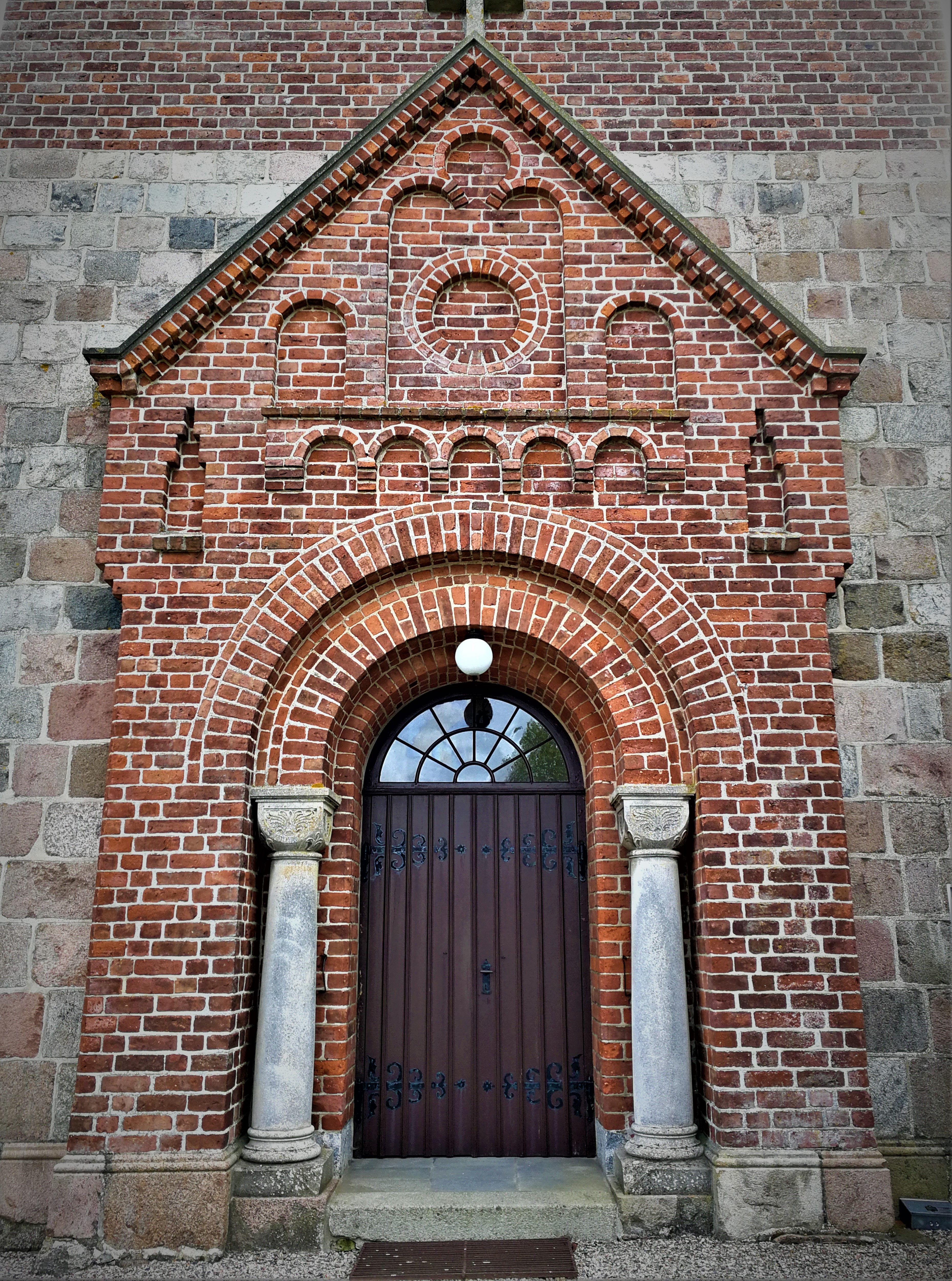 Maribovej 246, 4900 Nakskov, Danmark